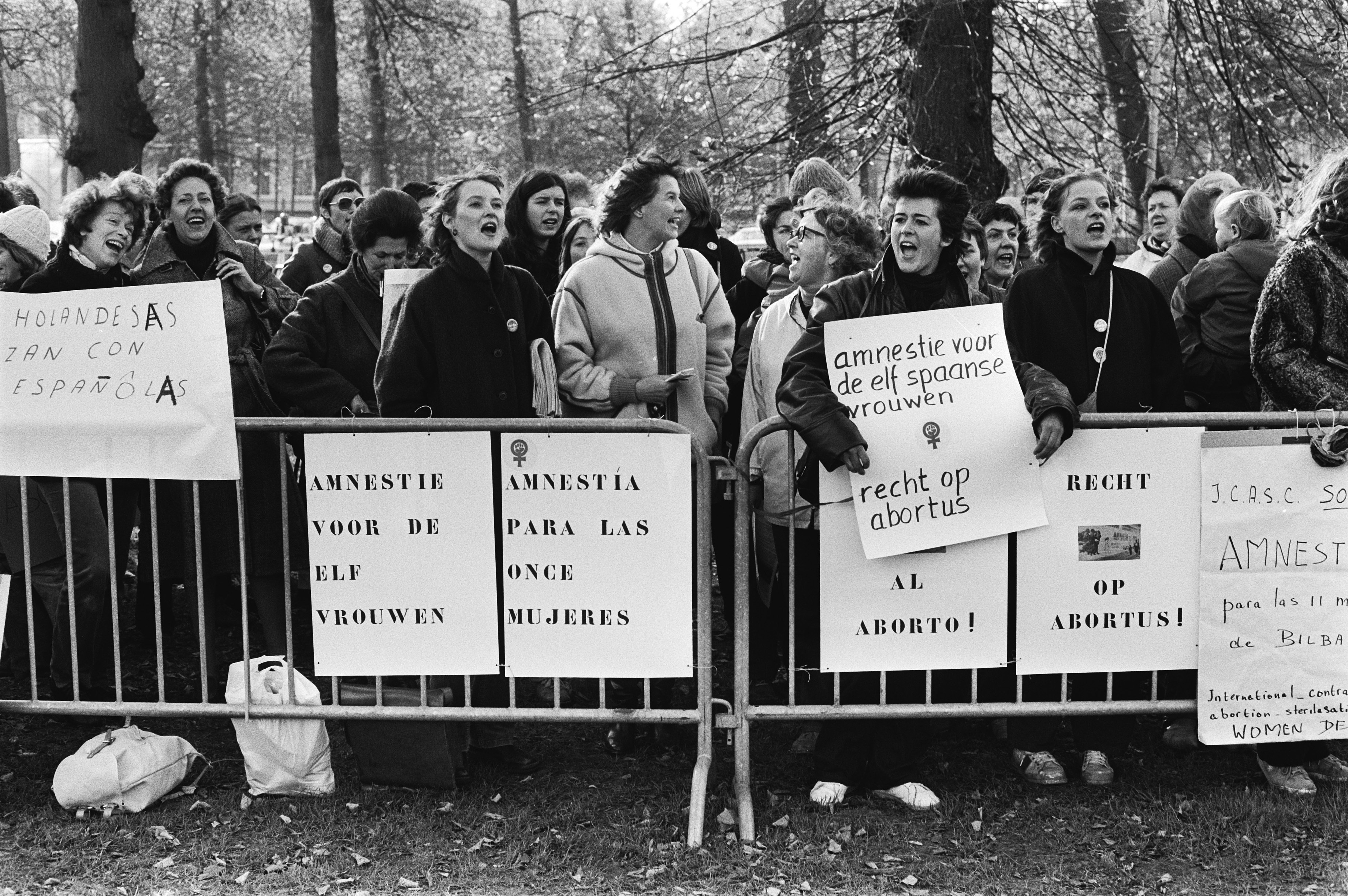 Collectie / Archief : Fotocollectie Anefo Reportage / Serie : Demonstratie van vrouwen voor de Spaanse ambassade in Den Haag tegen abortusprocessen in Spanje Beschrijving : Demonstrerende vrouwen met spandoeken; o.a. "Amnestie voor de elf Spaanse vrouwen", "Amnestia para las once mujeres" en "Recht op abortus" Datum : 26 oktober 1979 Locatie : Den Haag, Zuid-Holland Trefwoorden : abortussen, ambassades, betogingen, spandoeken, vrouwen Fotograaf : Bogaerts, Rob / Anefo Auteursrechthebbende : Nationaal Archief Materiaalsoort : Negatief (zwart/wit) Nummer archiefinventaris : bekijk toegang 2.24.01.05 Bestanddeelnummer : 930-5112